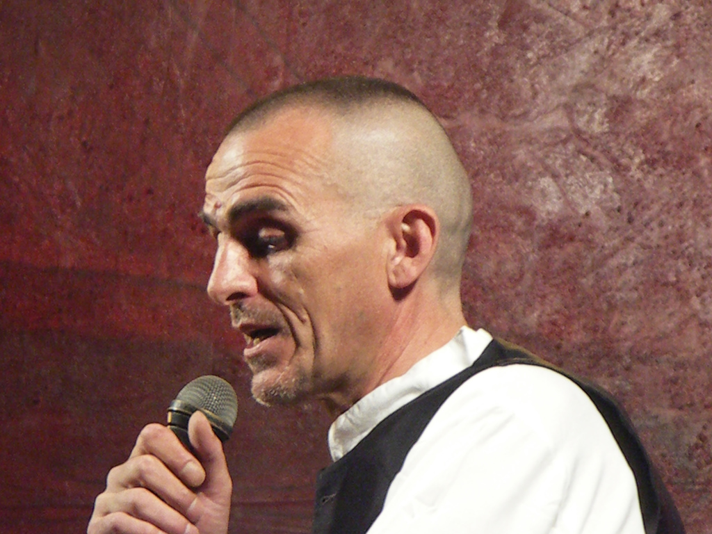 Italian Songwriter Giovanni Lindo Ferretti